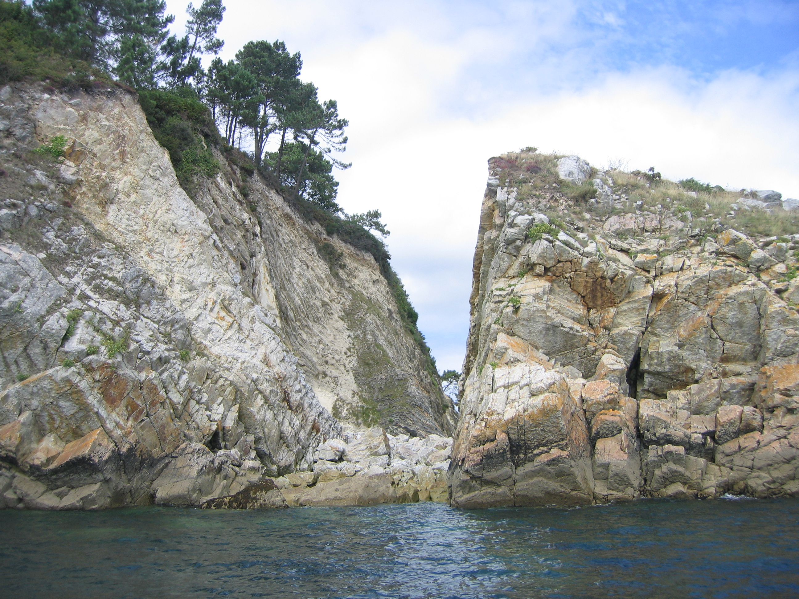 Visite en bateau des grottes de Morgat.